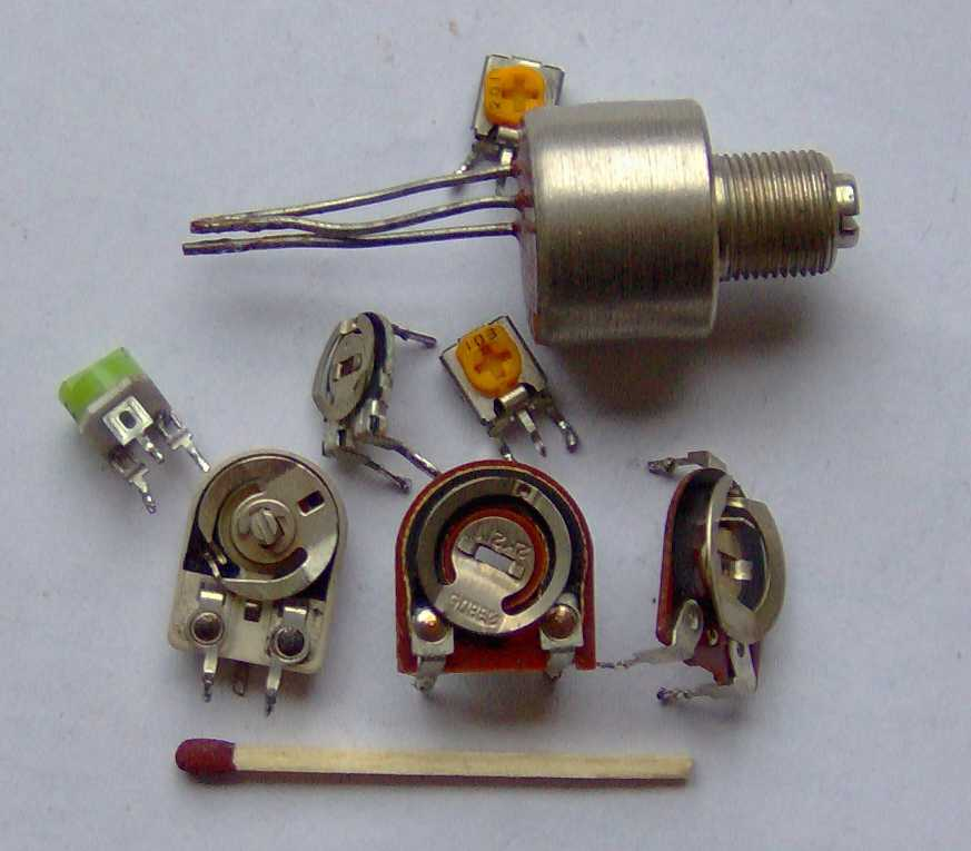 Electronic component - variable resistors - trimmers